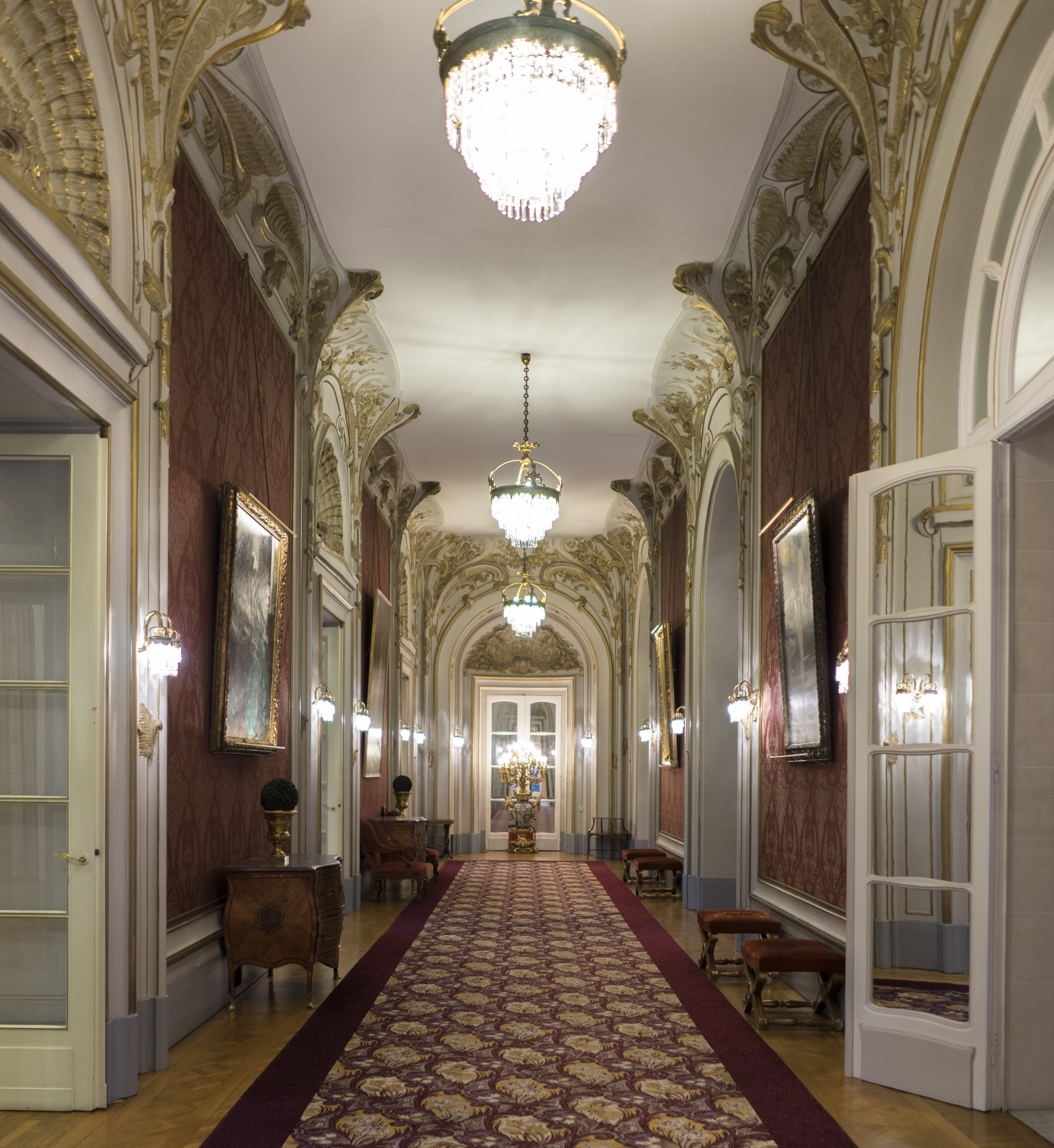 Französische Botschaft. Gang Dieses Bild wurde anlässlich des österreichischen Tags des Denkmals 2017 in Wien eingereicht.